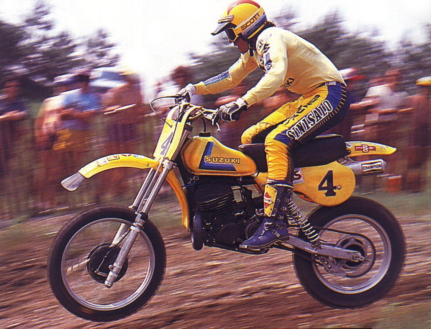 Als 2e eindigend in het WK500cc, voor Suzuki rijdend.